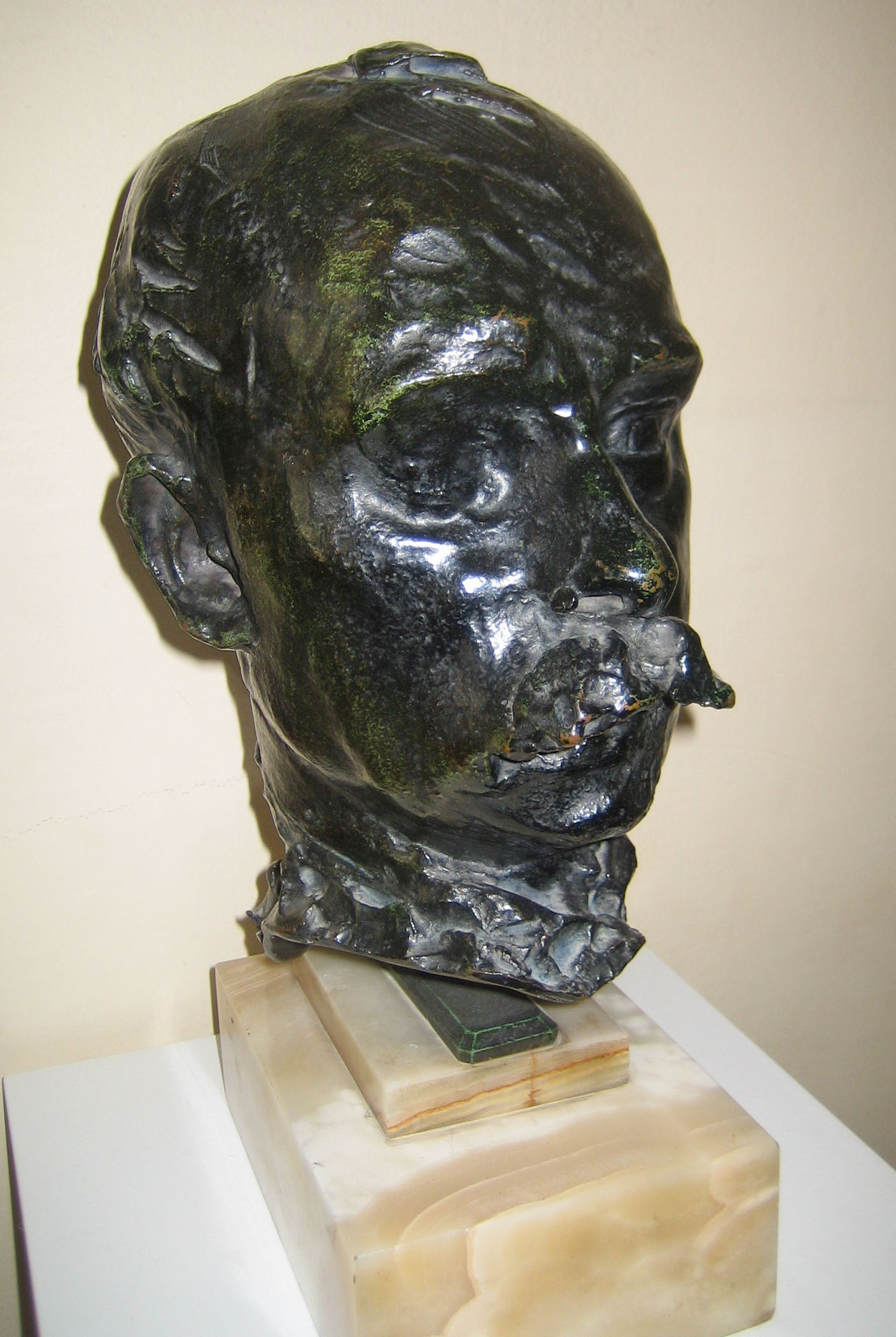 Tête d'Octave Mirbeau par Auguste Rodin. Musée Rodin, Paris.